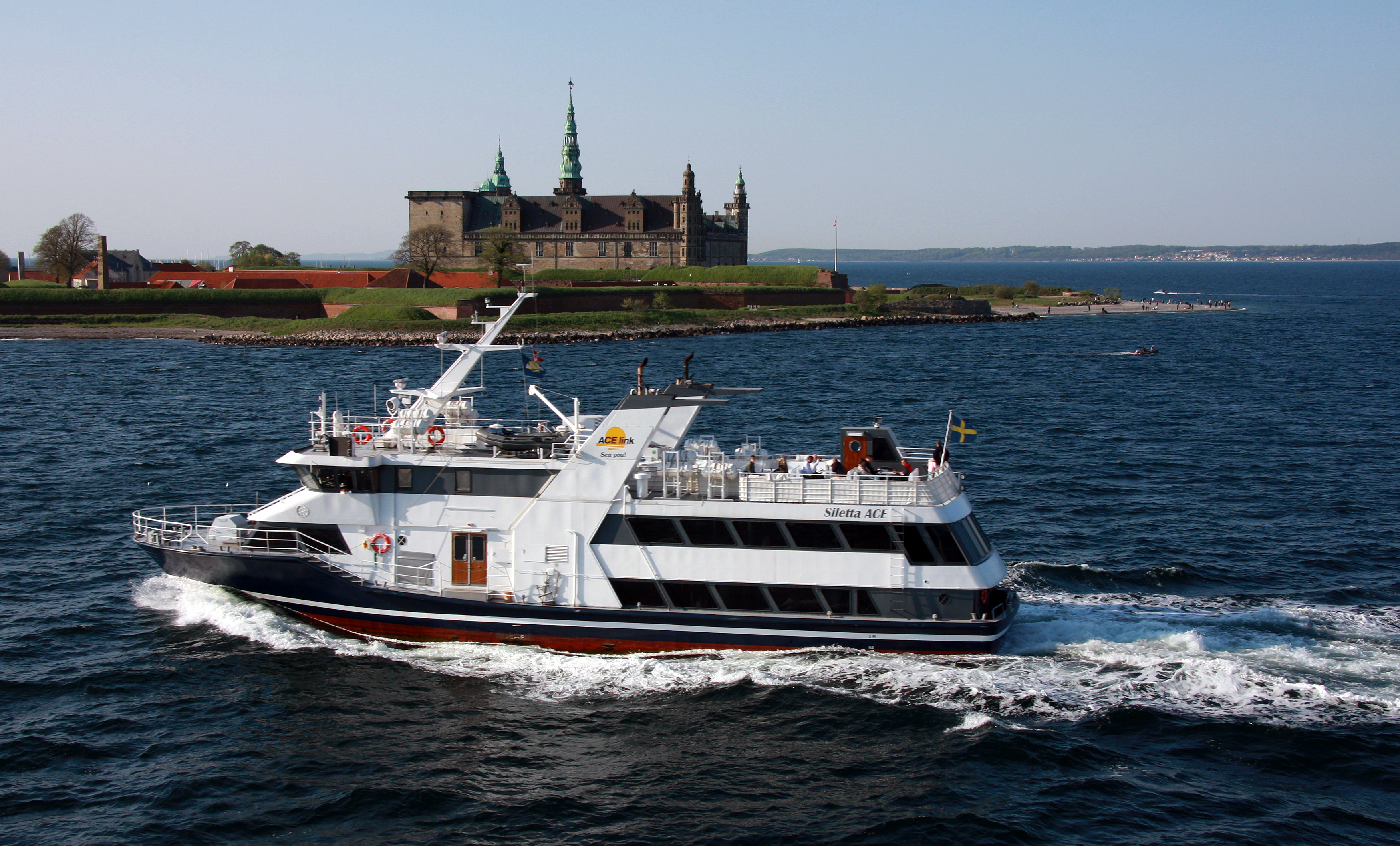 Färjan Siletta Ace på väg från Helsingborg i Sverige till Helsingör i Danmark med Kronborgs slott i bakgrunden